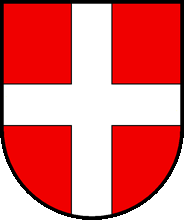 Wappen der früheren Ortsgemeinde Tobel